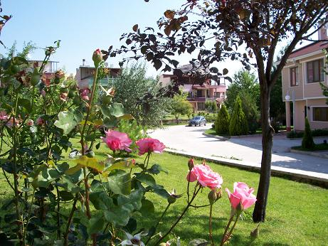 Güzelkent Eryaman Ankara